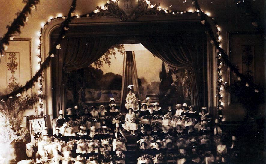 Election de la Reine de Cornouaille, Marie Guirriec, reine de l'Odet, le 30 septembre 1923 lors de la première fête des Reines bretonnes.